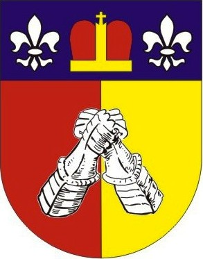 Znak obce Zdětín (okres Prostějov)